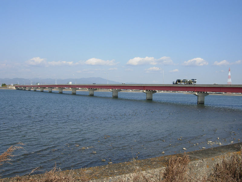 Toyokawa Bridge (豊川橋) in Toyohashi, Aichi, Japan.